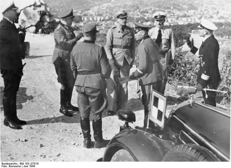 Frankreich, Johannes Blaskowitz bei Inspektion Generaloberst von Blaskowitz, Chef einer Heeresgruppe im Westen, überzeugt sich auf einer Besichtigungsreise von der Verteidigungsbereitschaft eines bestimmten Küstenabschnitts. Hoch über einer Stadt gewinnt der Generaloberst einen Einblick in die Verteidigungs-möglichkeiten. PK-Kriegsberichter Bronsema (Scherl) 27.6.44 [Herausgabedatum] [Frankreich.- Generaloberst Johannes Blaskowitz, Oberbefehlshaber der Heeresgruppe G, bei Inspektion eines Küstenabschnitts] Abgebildete Personen: Blaskowitz, Johannes: 1883-1948; Generaloberst, Ritterkreuz (RK), Heer, Deutschland (PND 119093480)